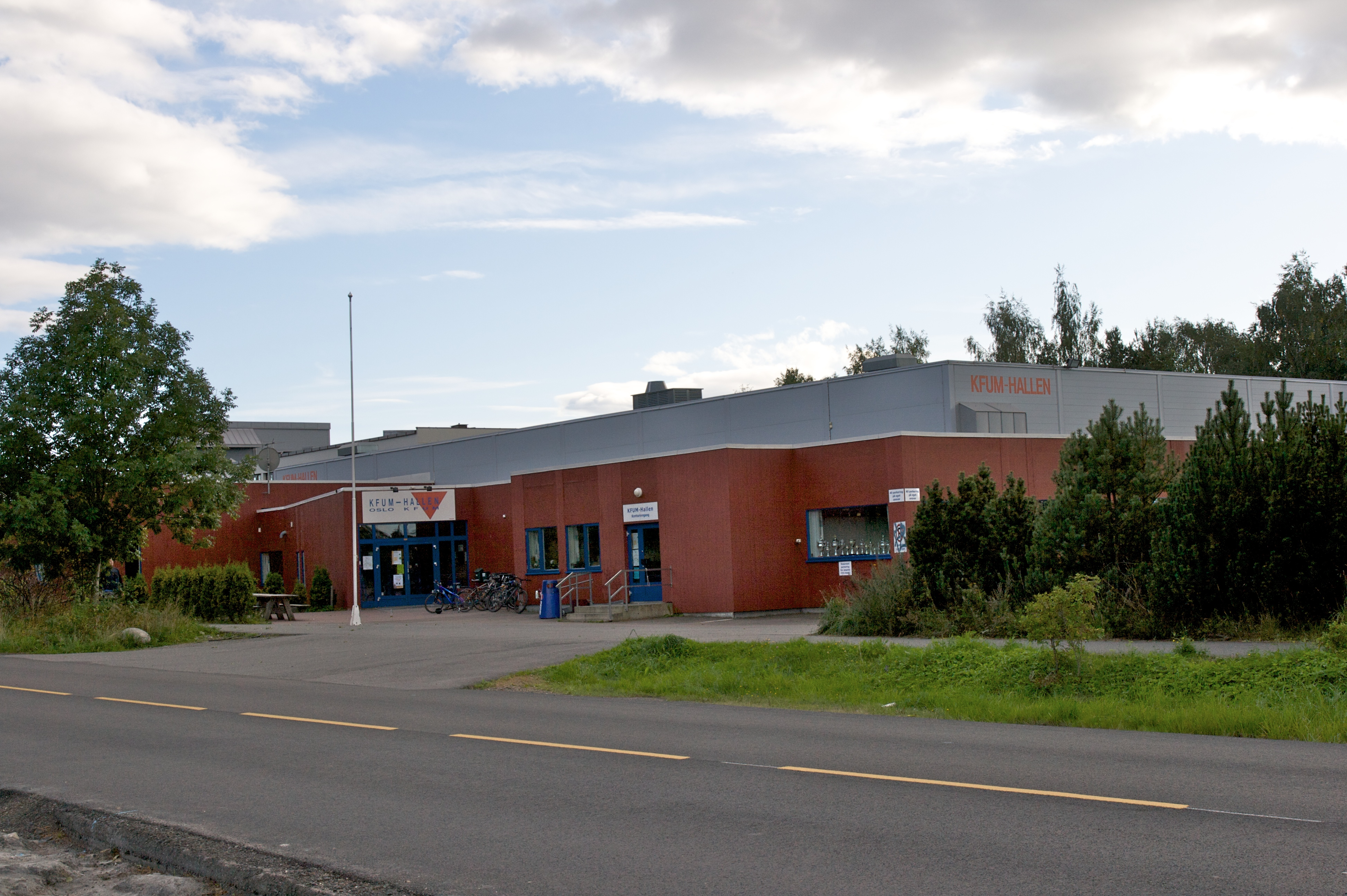 KFUM-hallen. Ekeberg i Oslo.